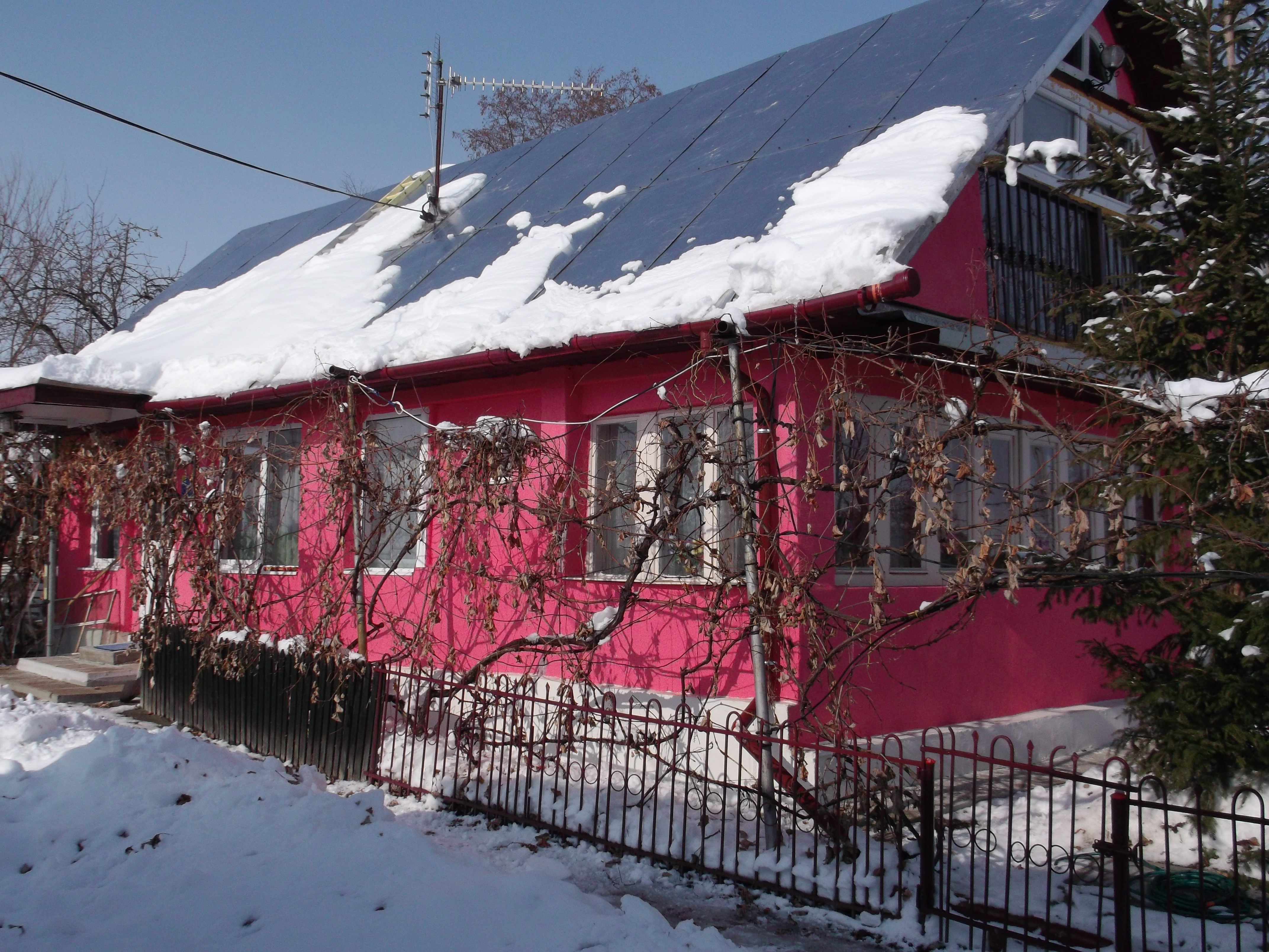 Casa traditionala { in doua ape } din Aruncuta ,Cluj